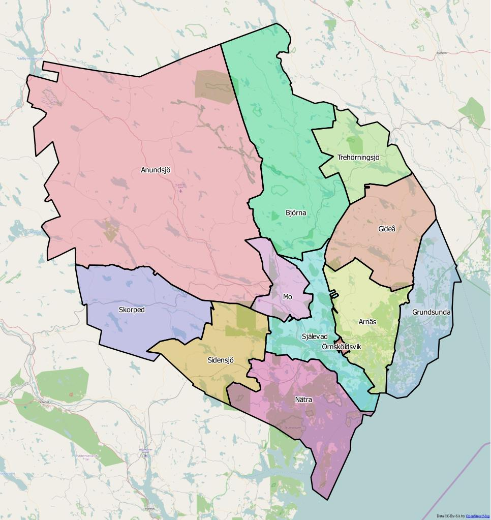 Distriktsindelningen i Örnsköldsviks kommun World file 278.01255796634512762 0 0 -278.01255796634512762 1897853.19289250299334526 9361290.34914159402251244